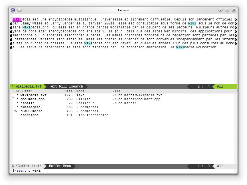 Capture d’écran d’Emacs 23.3.1 - minibuffer